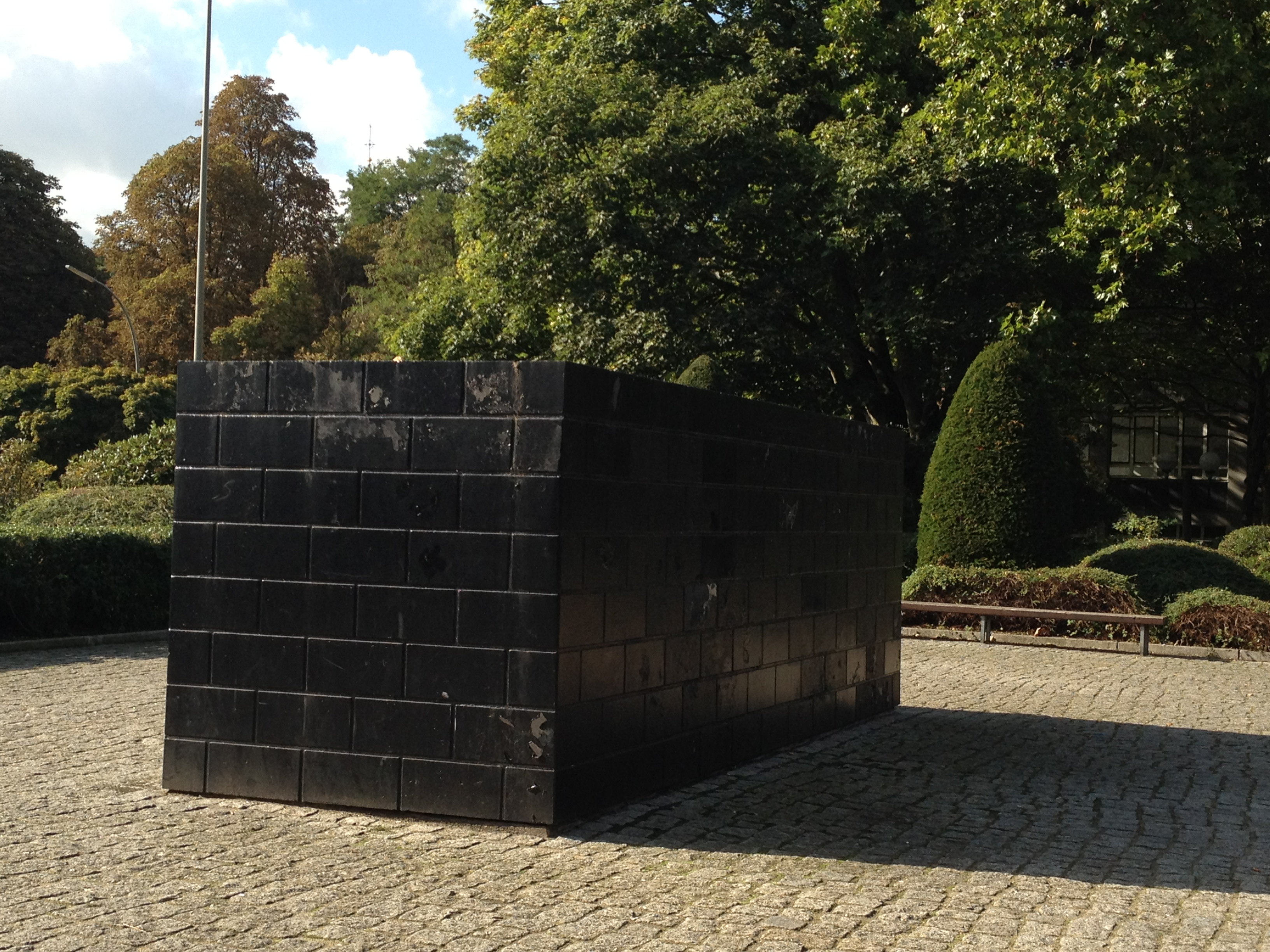 Gedenkmonument für die zerstörte Jüdische Gemeinde Altona